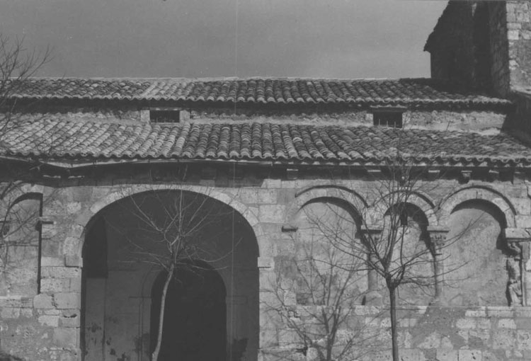 Iglesia - Barca (Soria) - Fotografía B/N